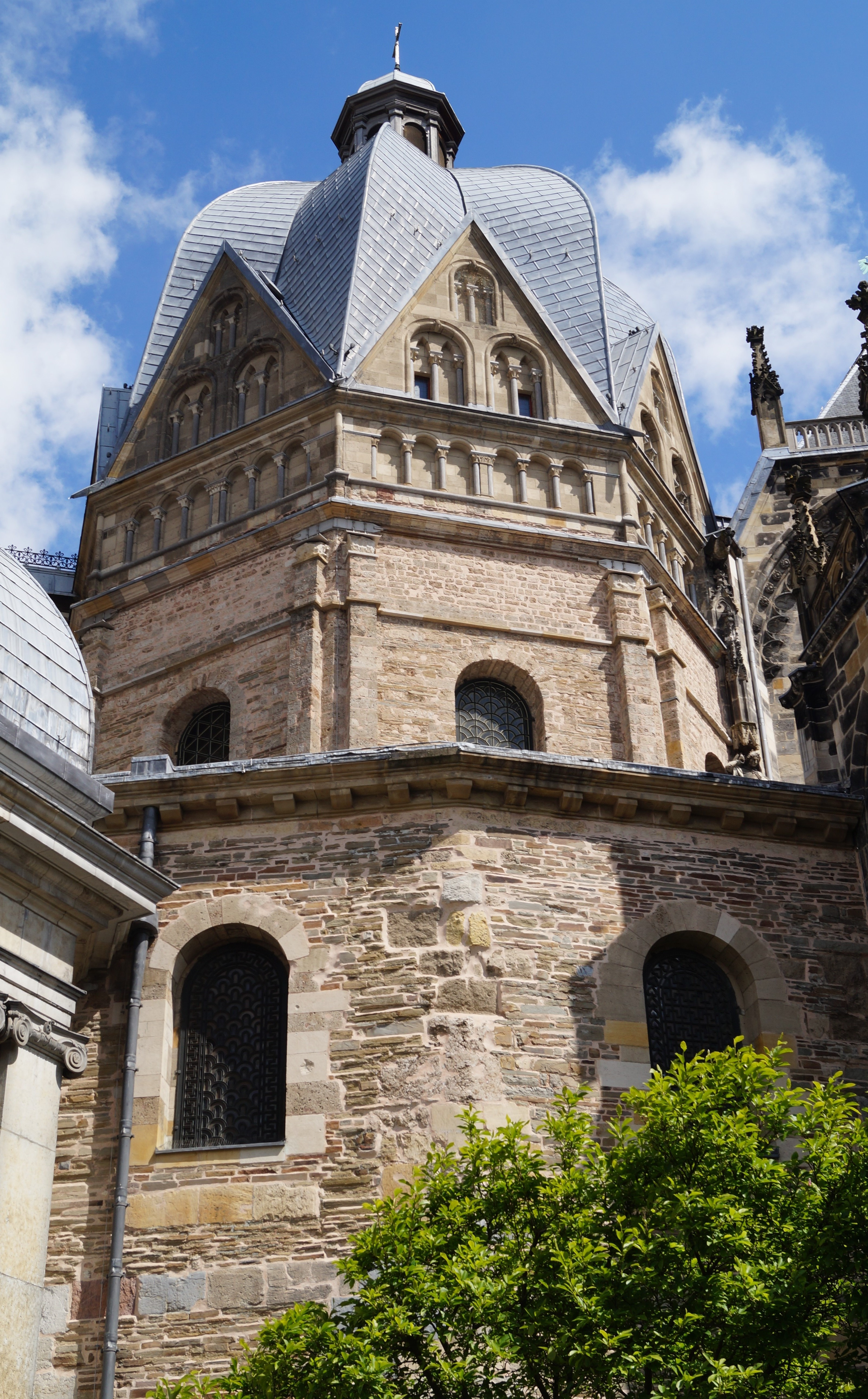 Aachener Dom: Pfalzkapelle und Oktogon vom Münsterplatz